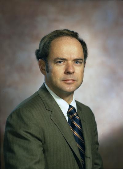 Representative Paul Kraabel, 1971